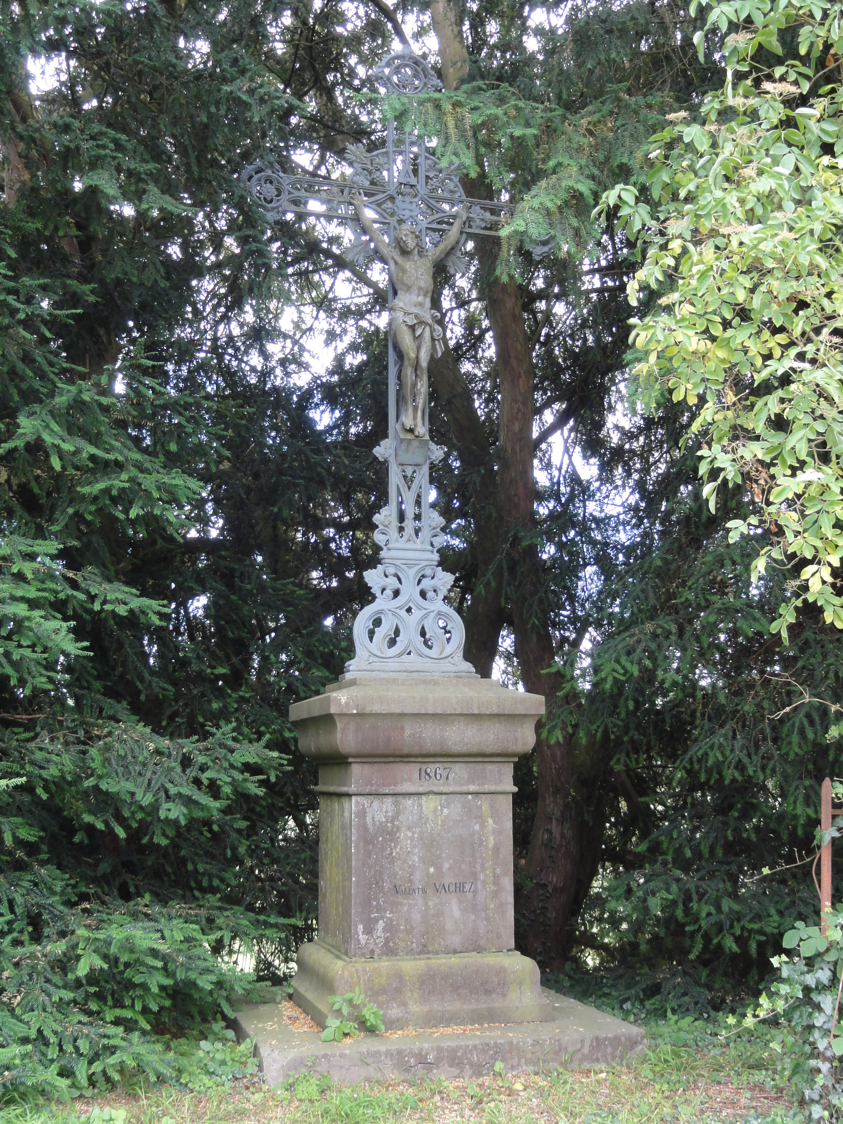 Braye-en-Thiérache (Aisne) croix de chemin, Val Saint Pierre